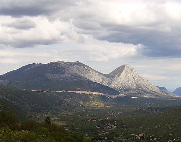 Pogled na Vrgorsko gorje s prijevoja Turija